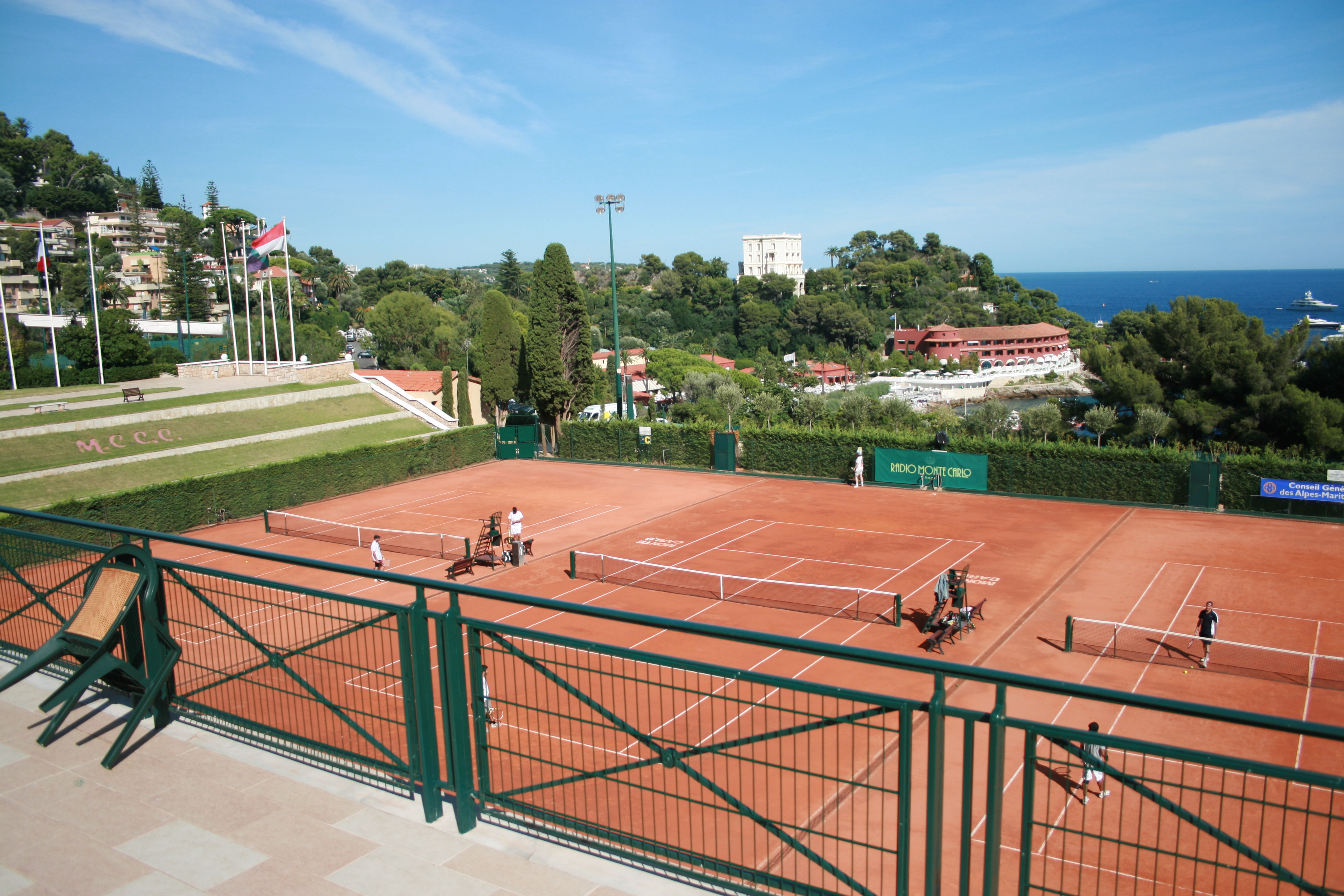 Terrains vus des loges, les 2 courts extrêmes étant recouverts de tribunes lors du tournoi officiel